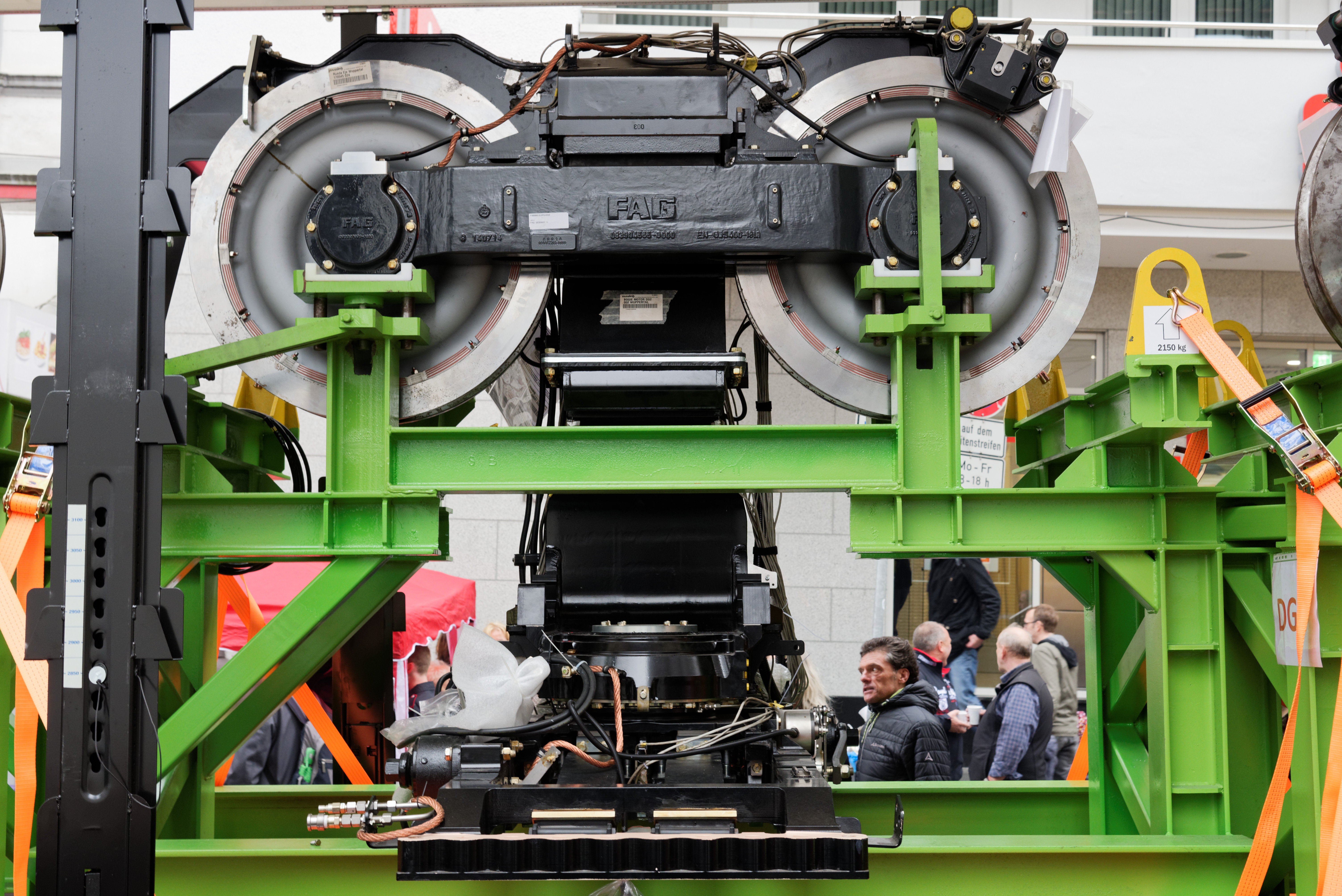 Antriebssatz einer neuen Schwebebahn in Wuppertal